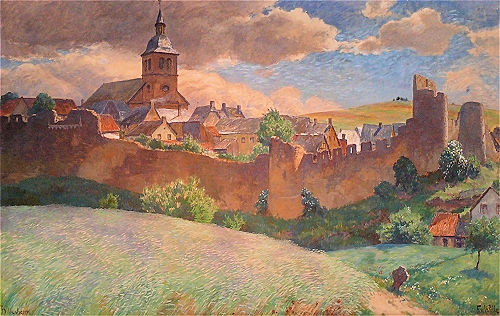 Hillesheim